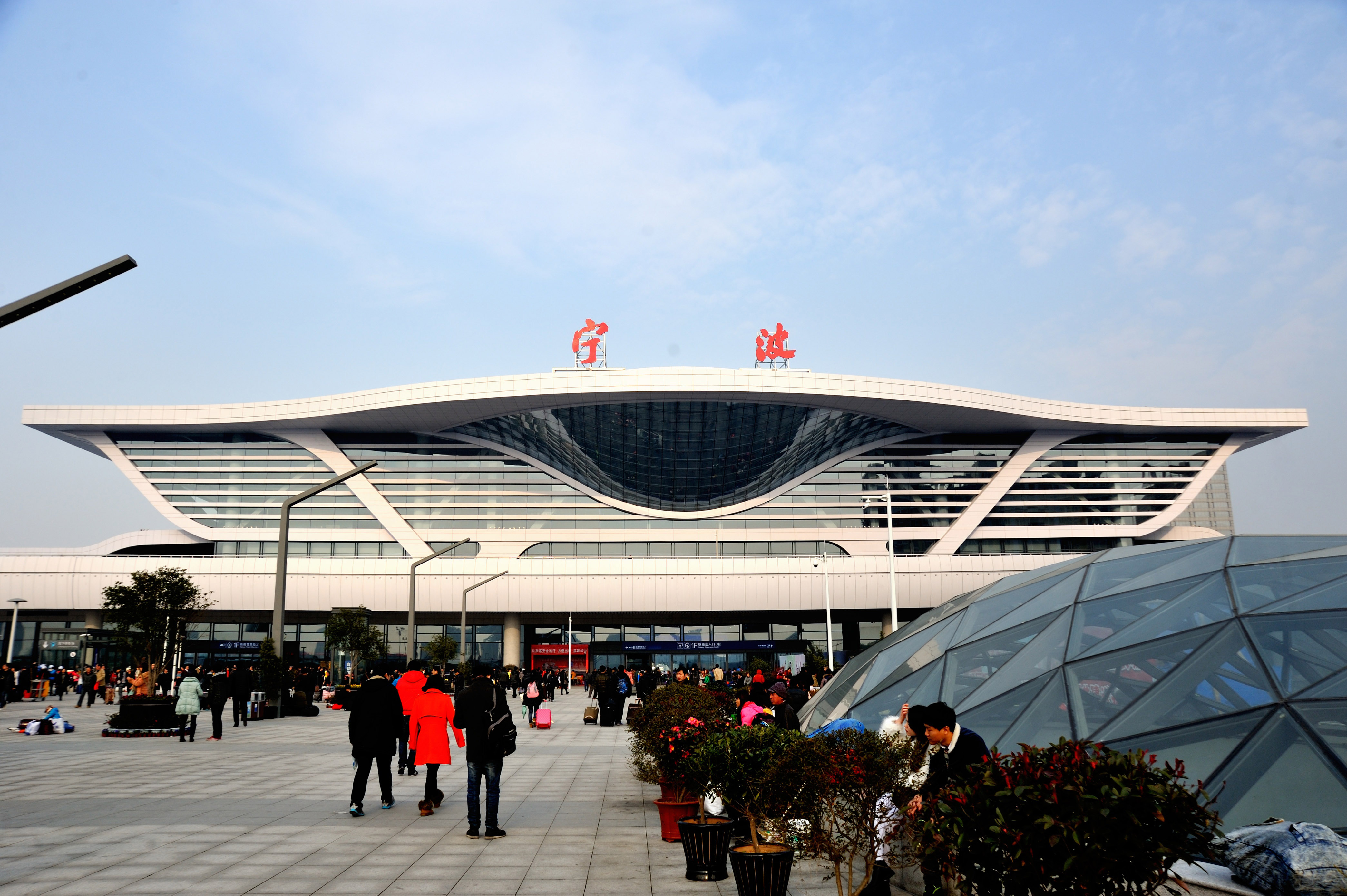 宁波站南面